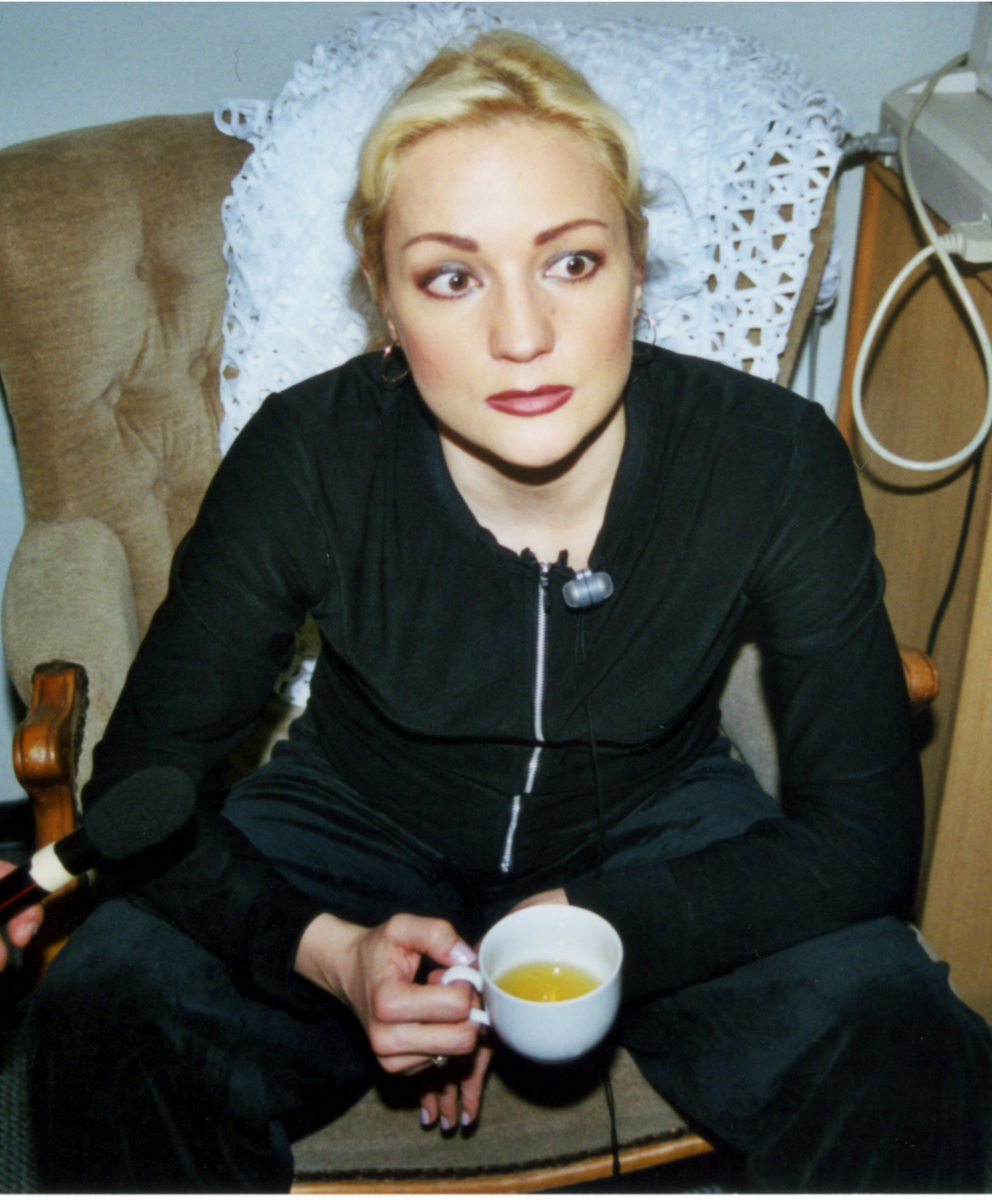 Татьяна Буланова: Германия, Кобленц, дискотека Cha-Cha,апрель 2002 года.